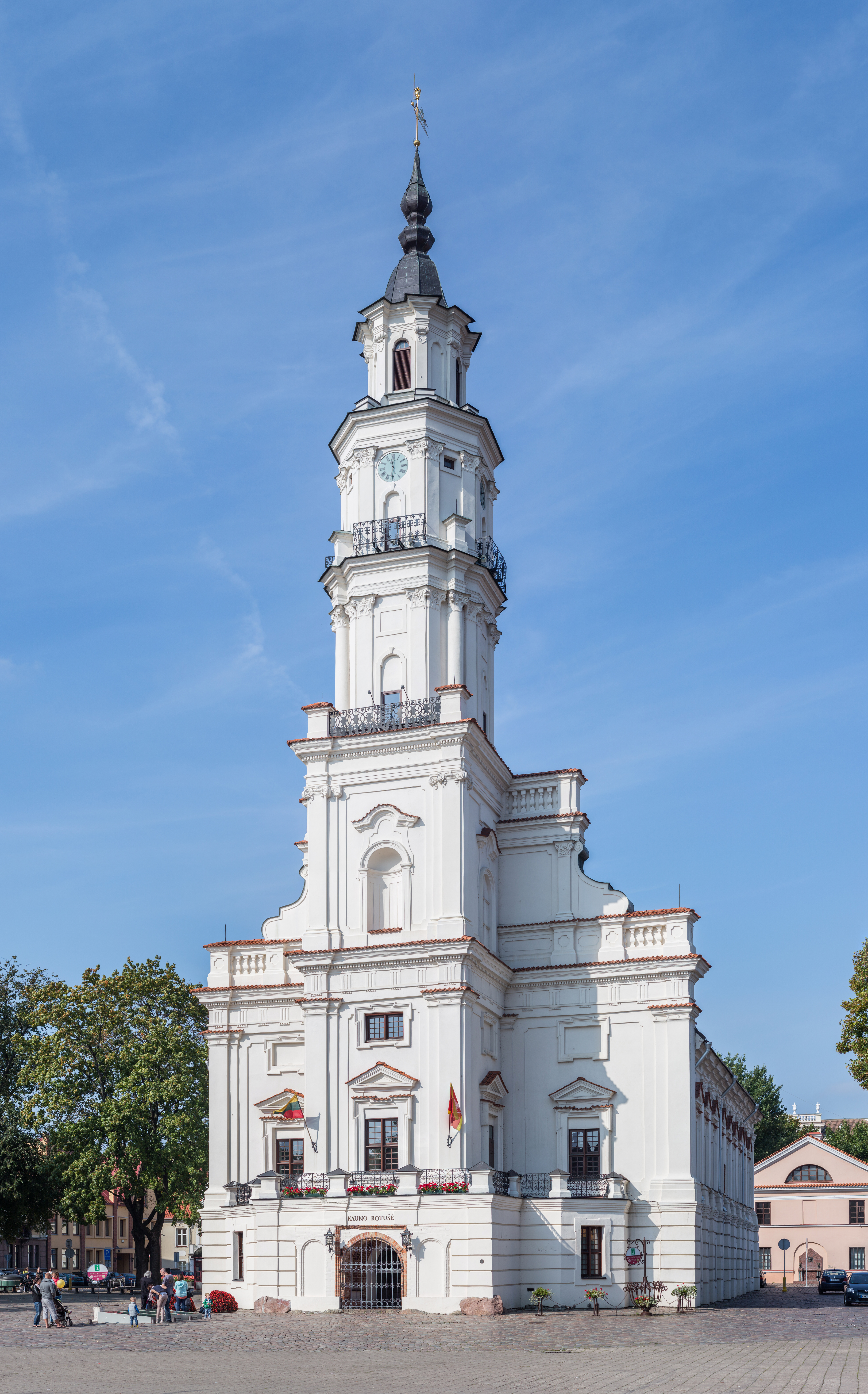 Kaunas Town Hall, Kaunas, Lithuania.